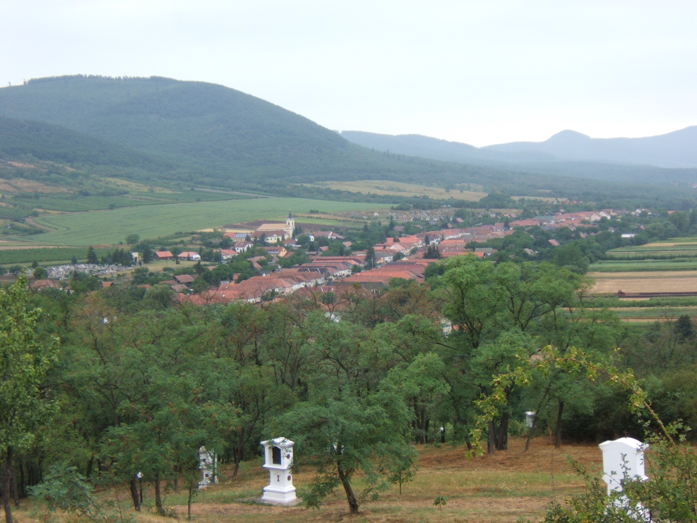 Hercegkút, látkép